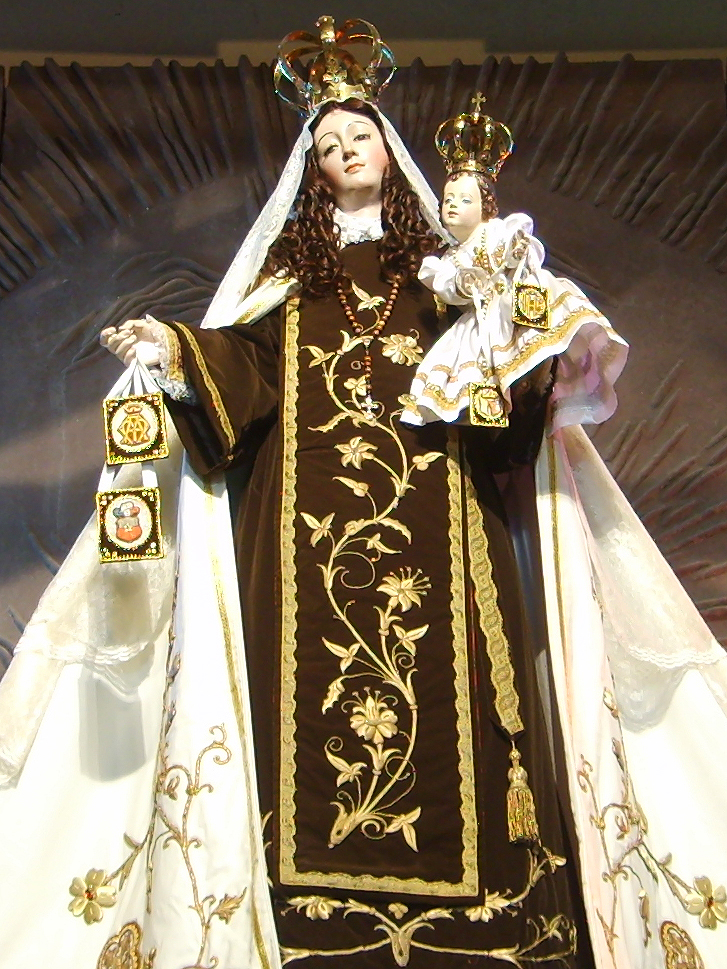 Figura de la Virgen del Carmen de Chile, en el Templo Votivo de Maipú. La imagen fue donada por la Sra. Rosalía Mujíca de Gutiérrez el 16 de diciembre de 1956. Más información en Maipú a su Servicio: El Templo Votivo de Maipú.